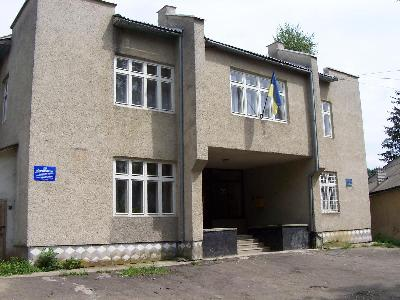 Будівля Березниківської сільської ради.